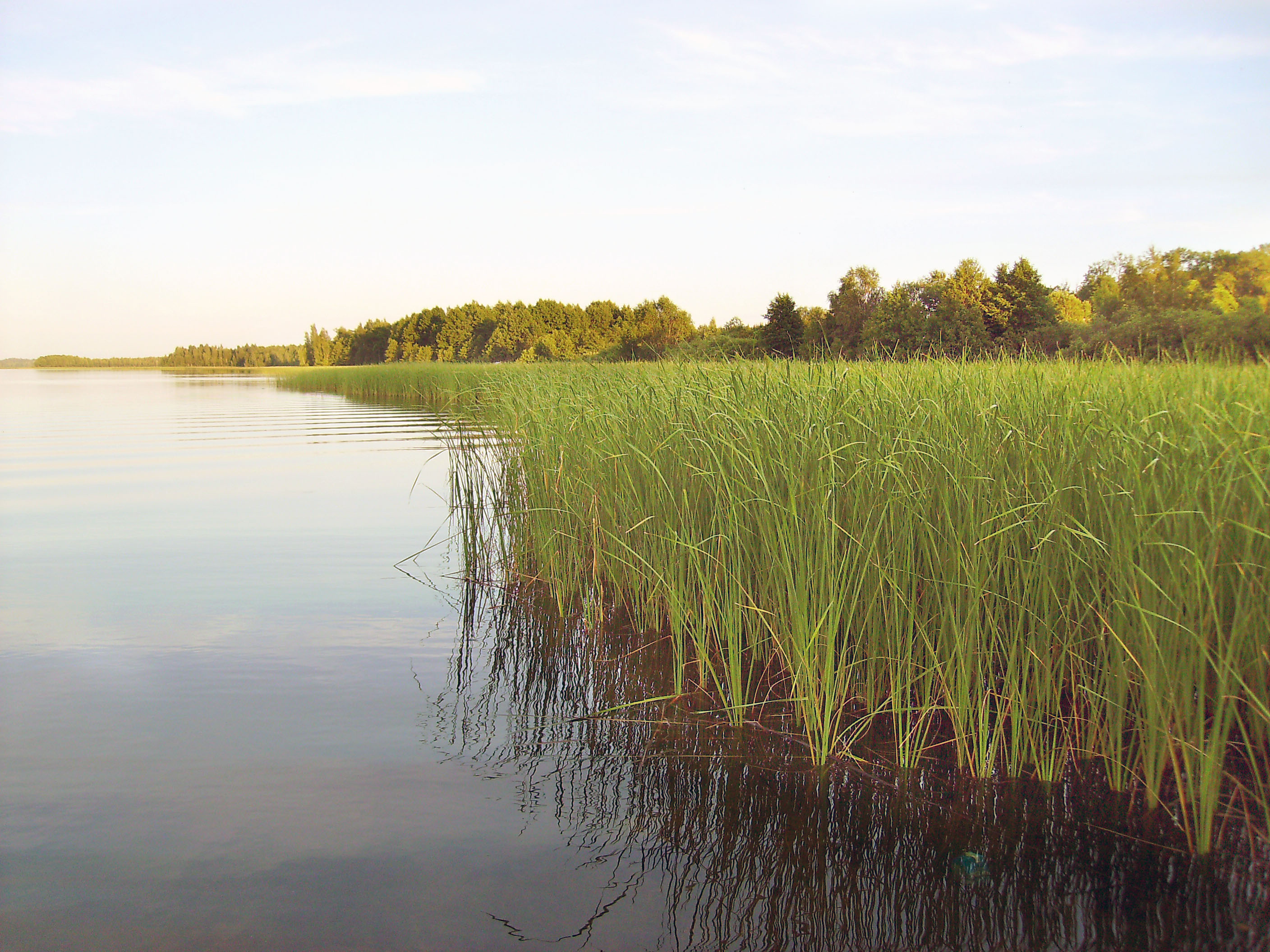 Harilik pilliroog saadjärvel